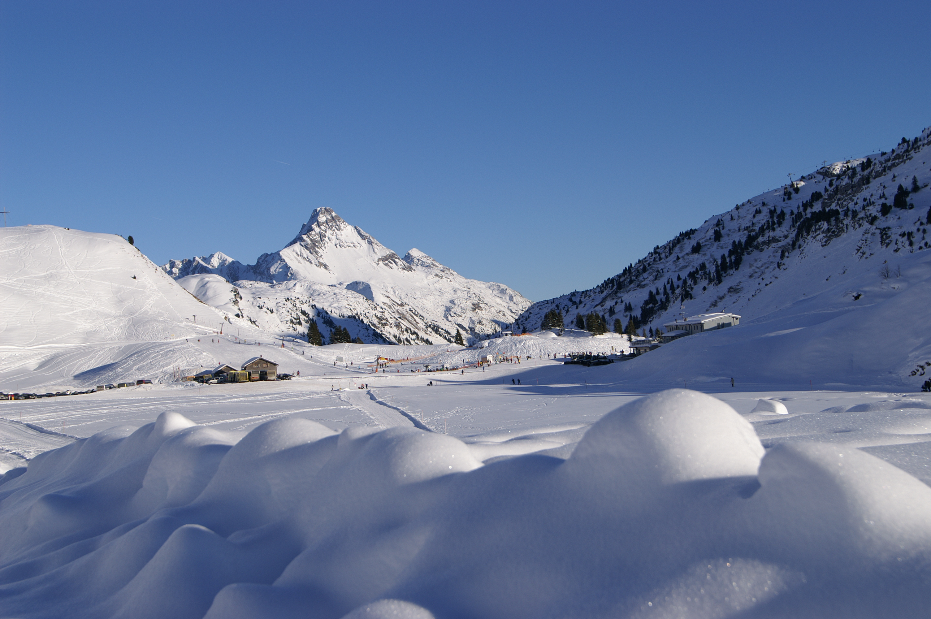 "Einschneit" der Hochtannbergpass im Hintergrund der Biberkopf 2599m. Links im Bild der Simmel (Hochtannbergpass) mit dem Weltfriedenskreuz. Rechts das Skigebiet um den Saloberkopf.